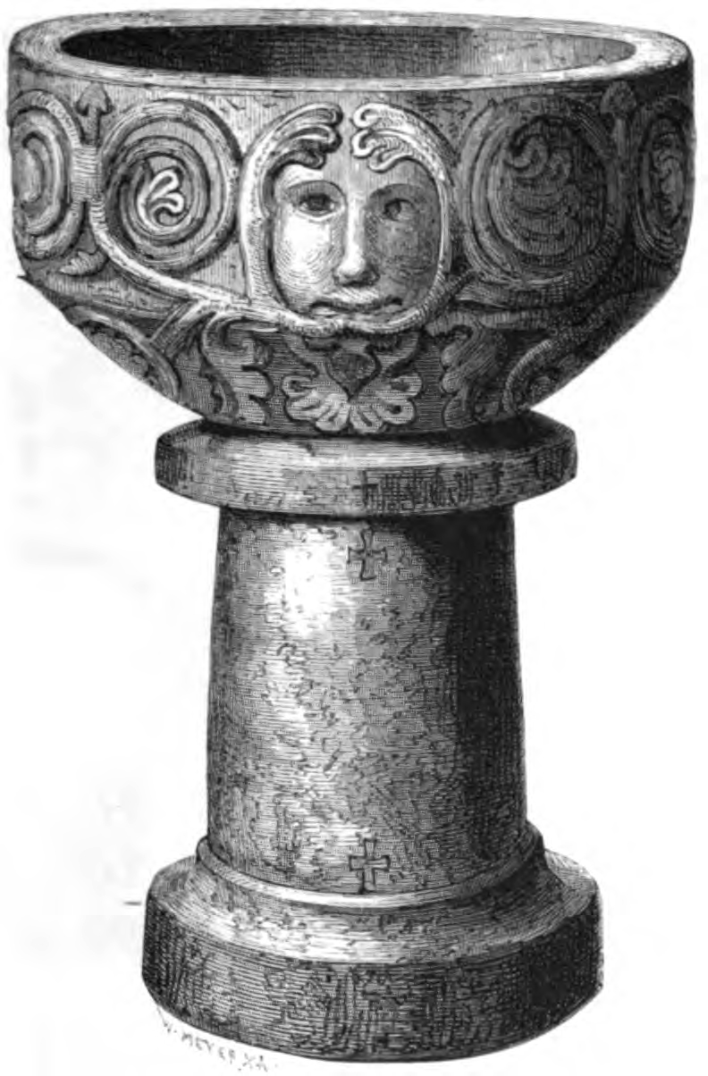 Solberga kyrka, Bohuslän. Dopfunt